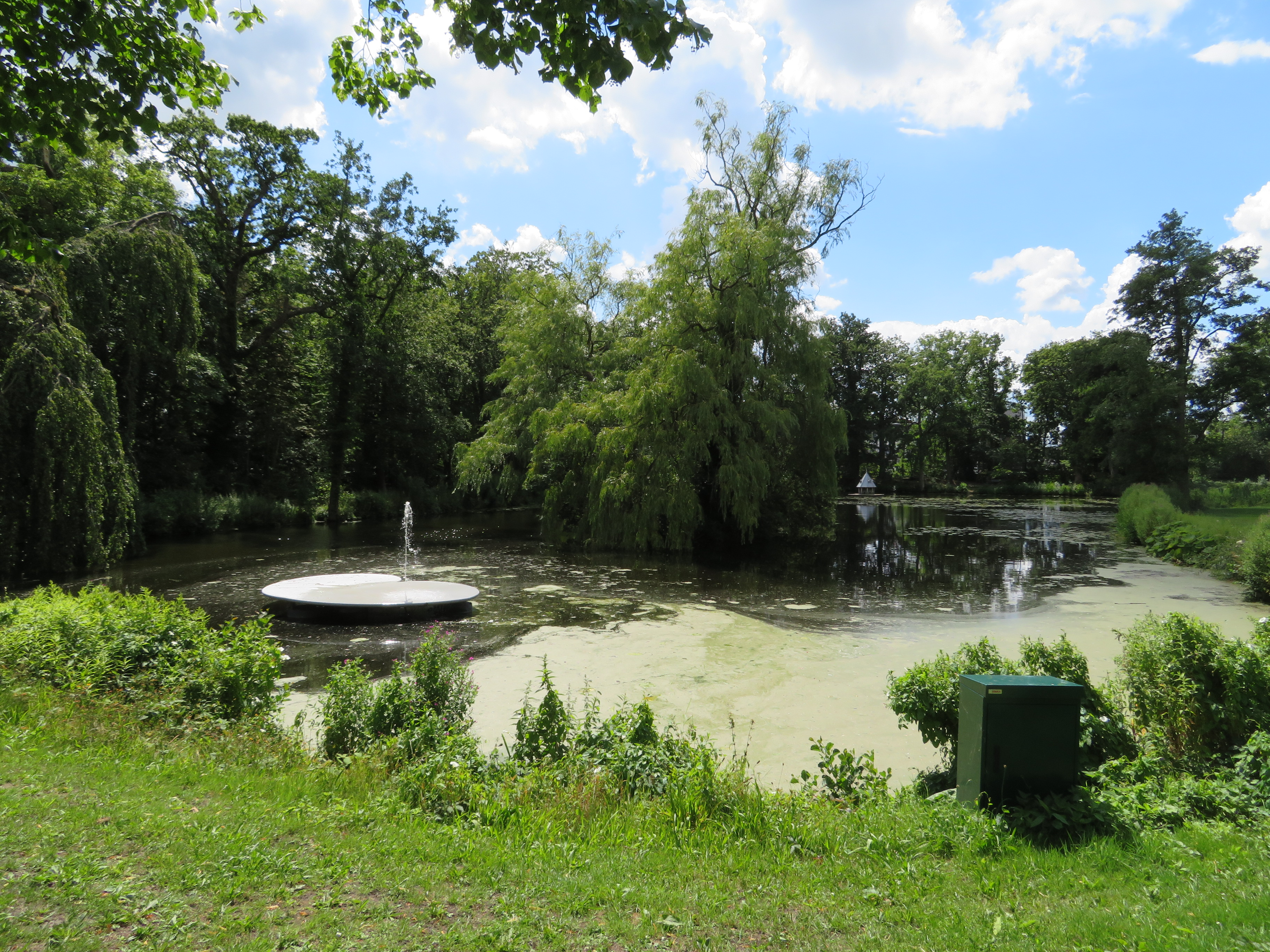 Park Heremastate in Joure, Friesland